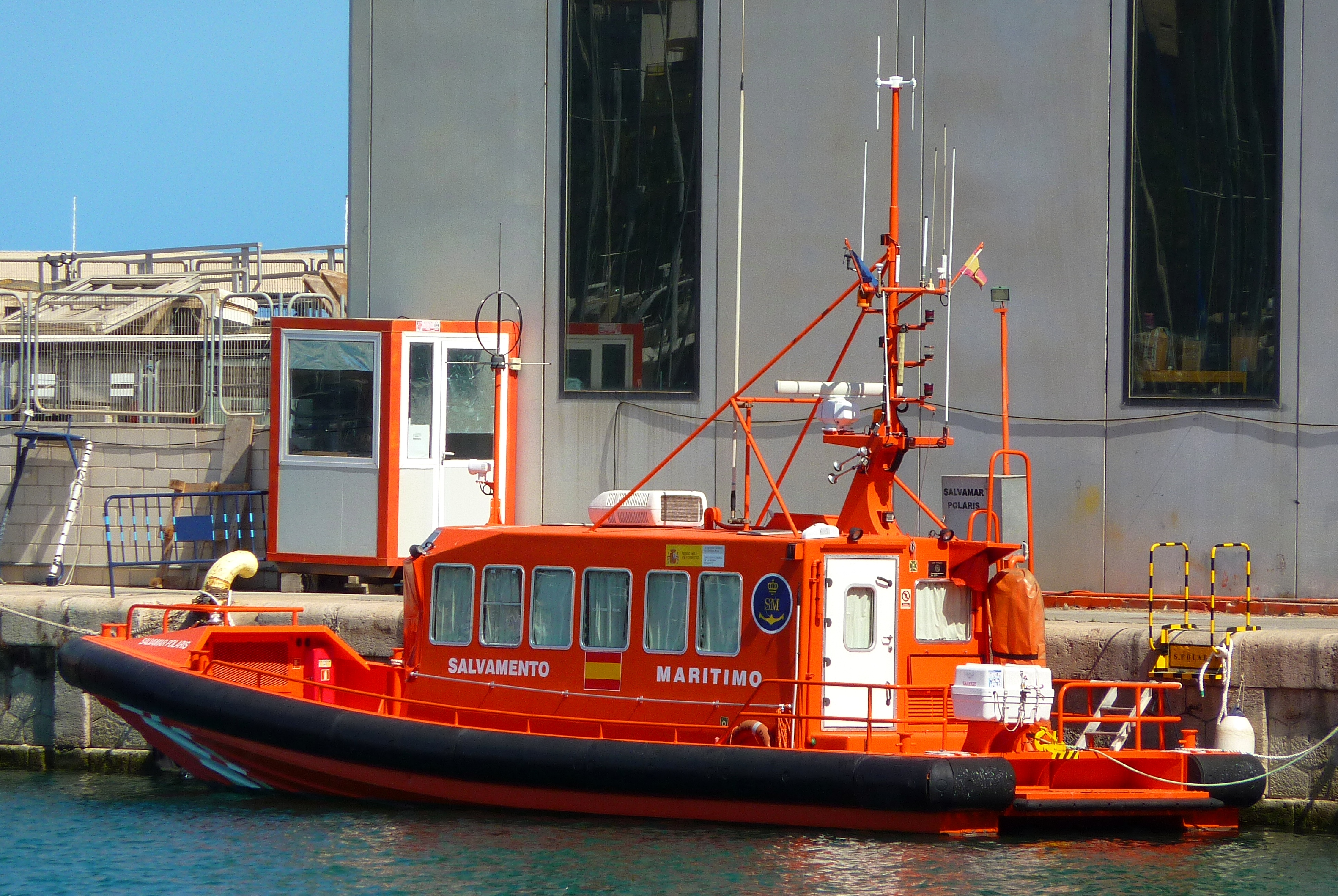 Embarcación de la Sociedad Estatal de Salvamento y Seguridad Marítima "Salvamar Polaris".